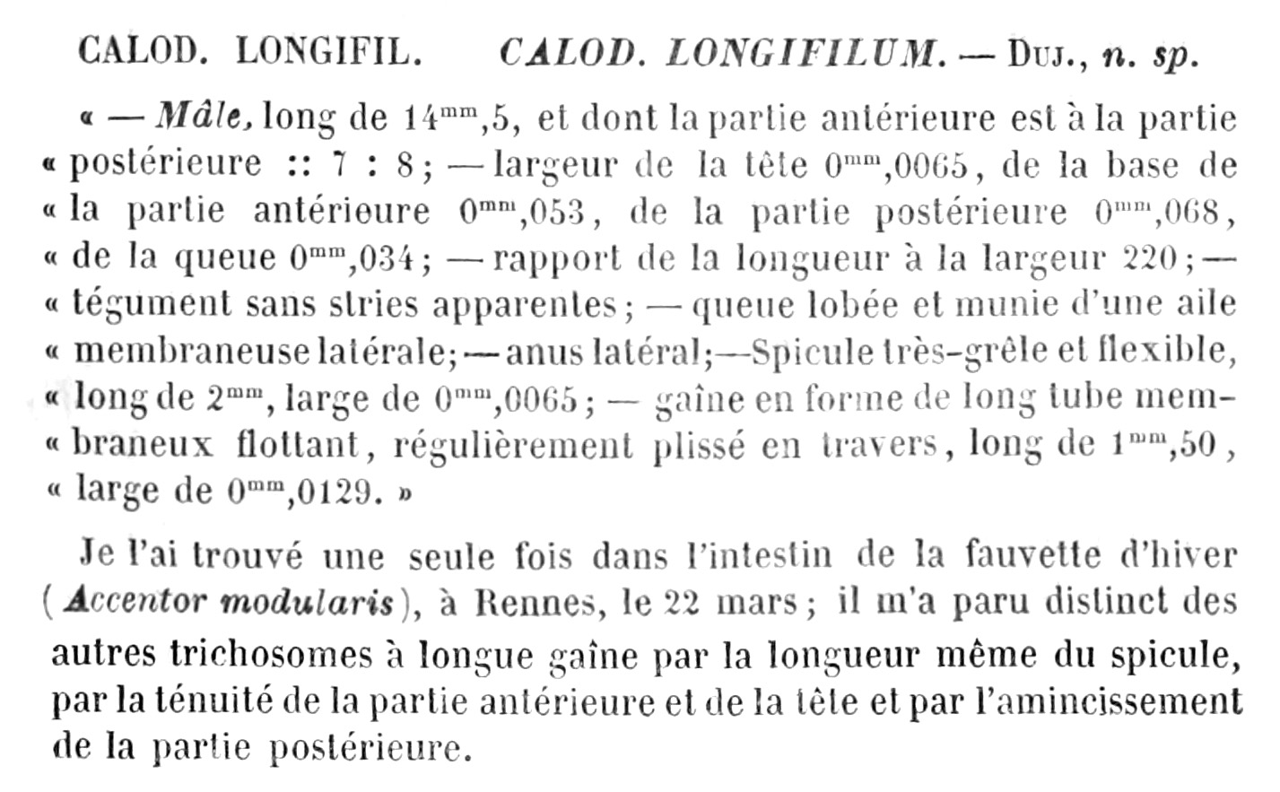 Calodium longifilum Dujardin, 1845 - diagnosis